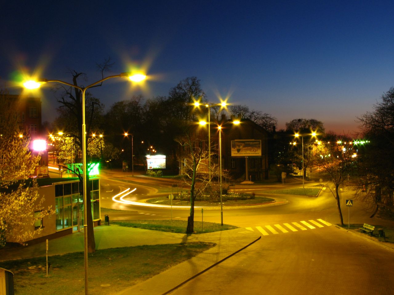 Zielona Góra - Plac Kolejarza